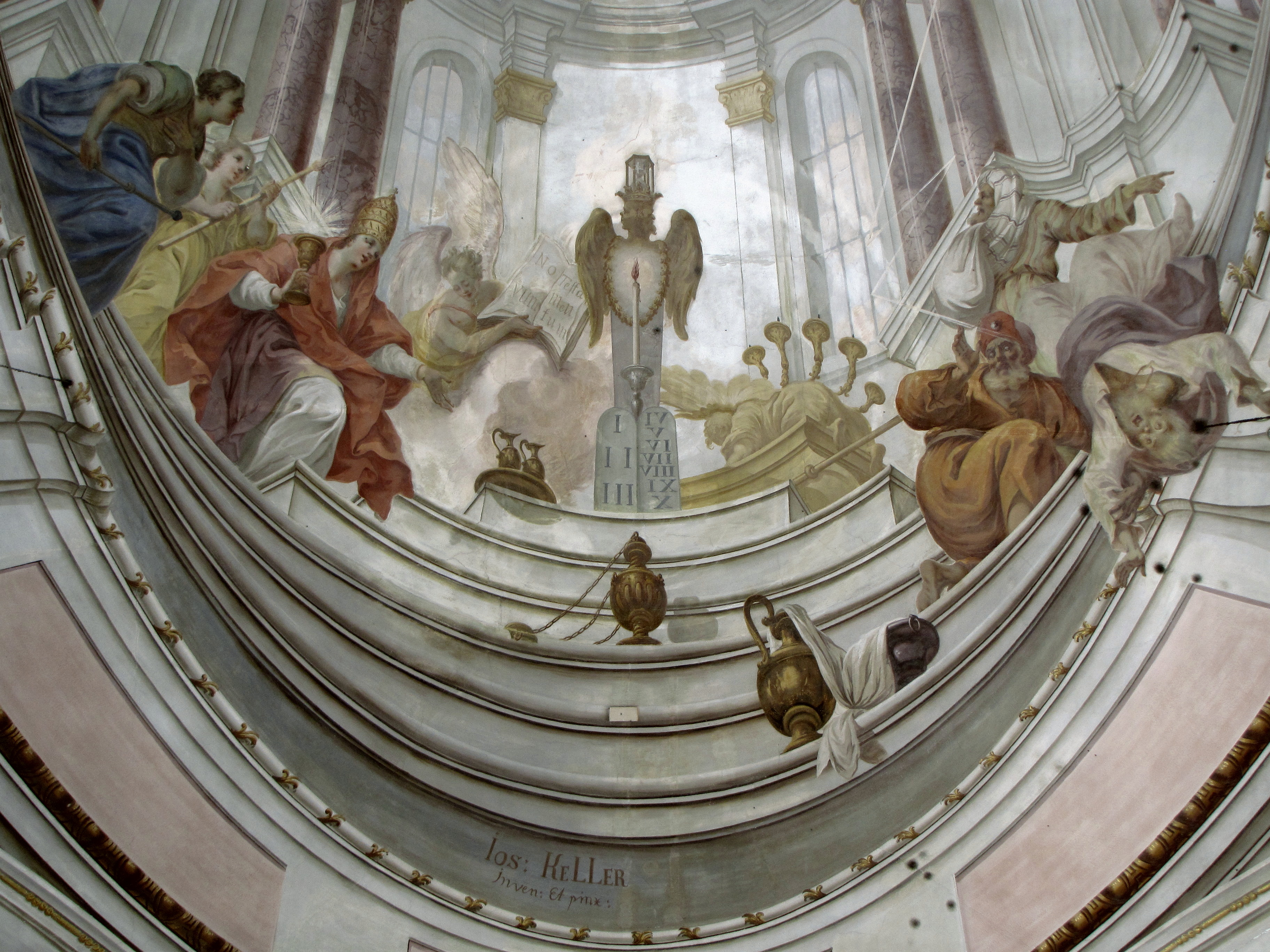 Deckenfresko in der Kirche von Stötten (Ostallgäu) von Joseph Keller